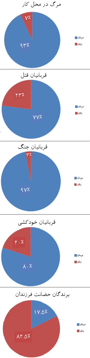 مقایسه ی آماری زنان و مردان در مشکلات جامعه